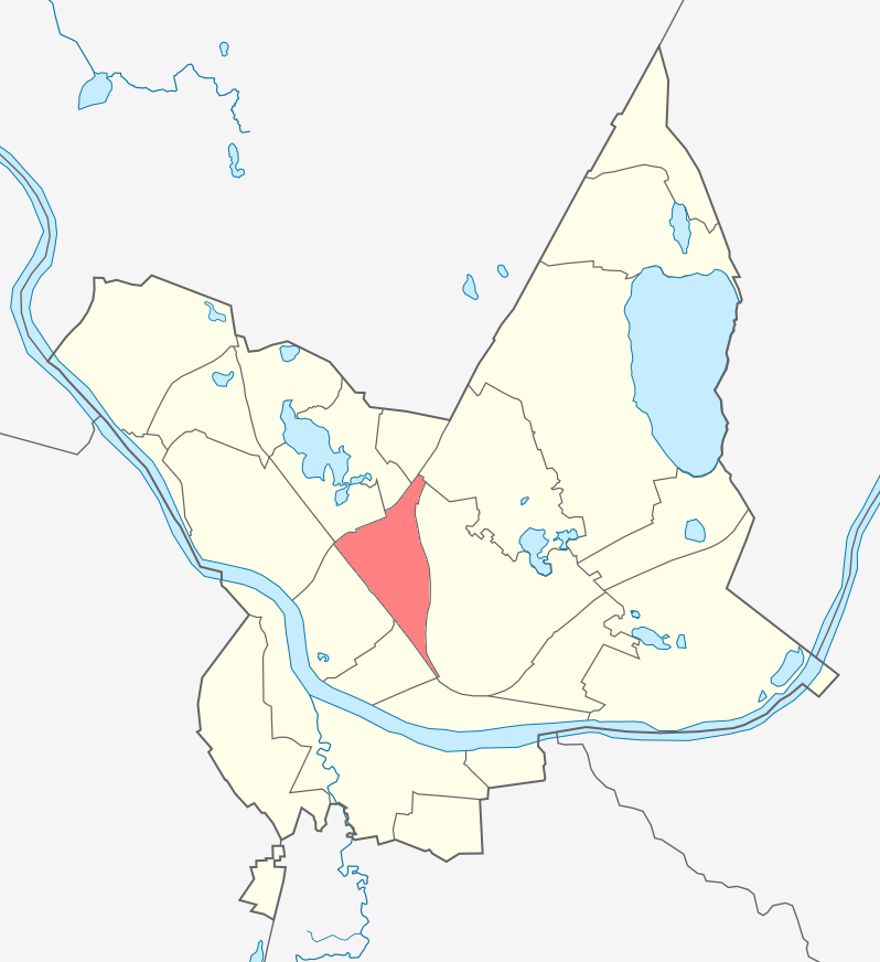 Микрорайон Железнодорожник карте Даугавпилса.